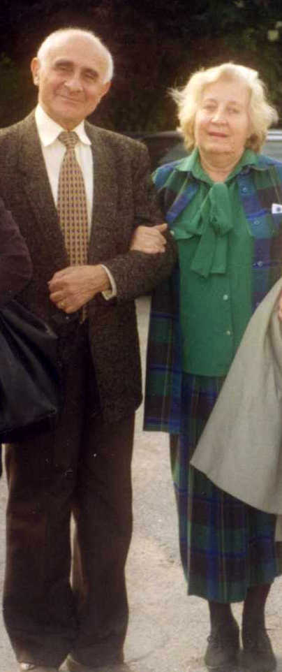 Nicolae şi Bianca Balotă, lângă Paris